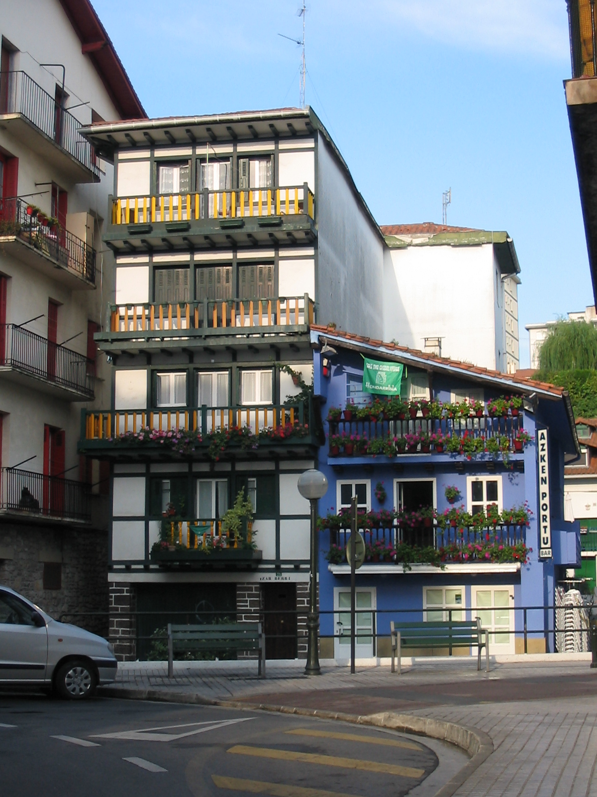 Village de pêcheurs de Fontarabie (Pays basque espagnol). Je suis l'auteur du cliché pris en août 2006